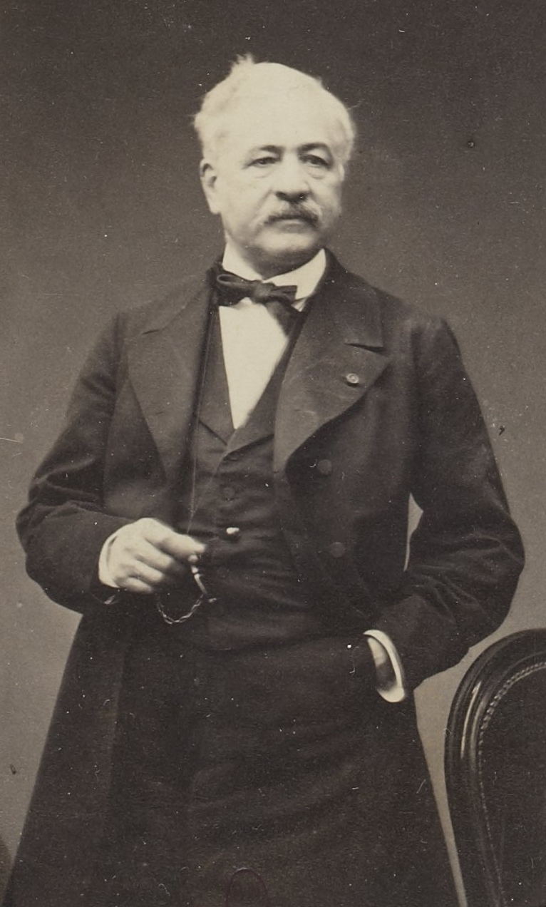 Personnalités françaises et étrangères sous le Second Empire.